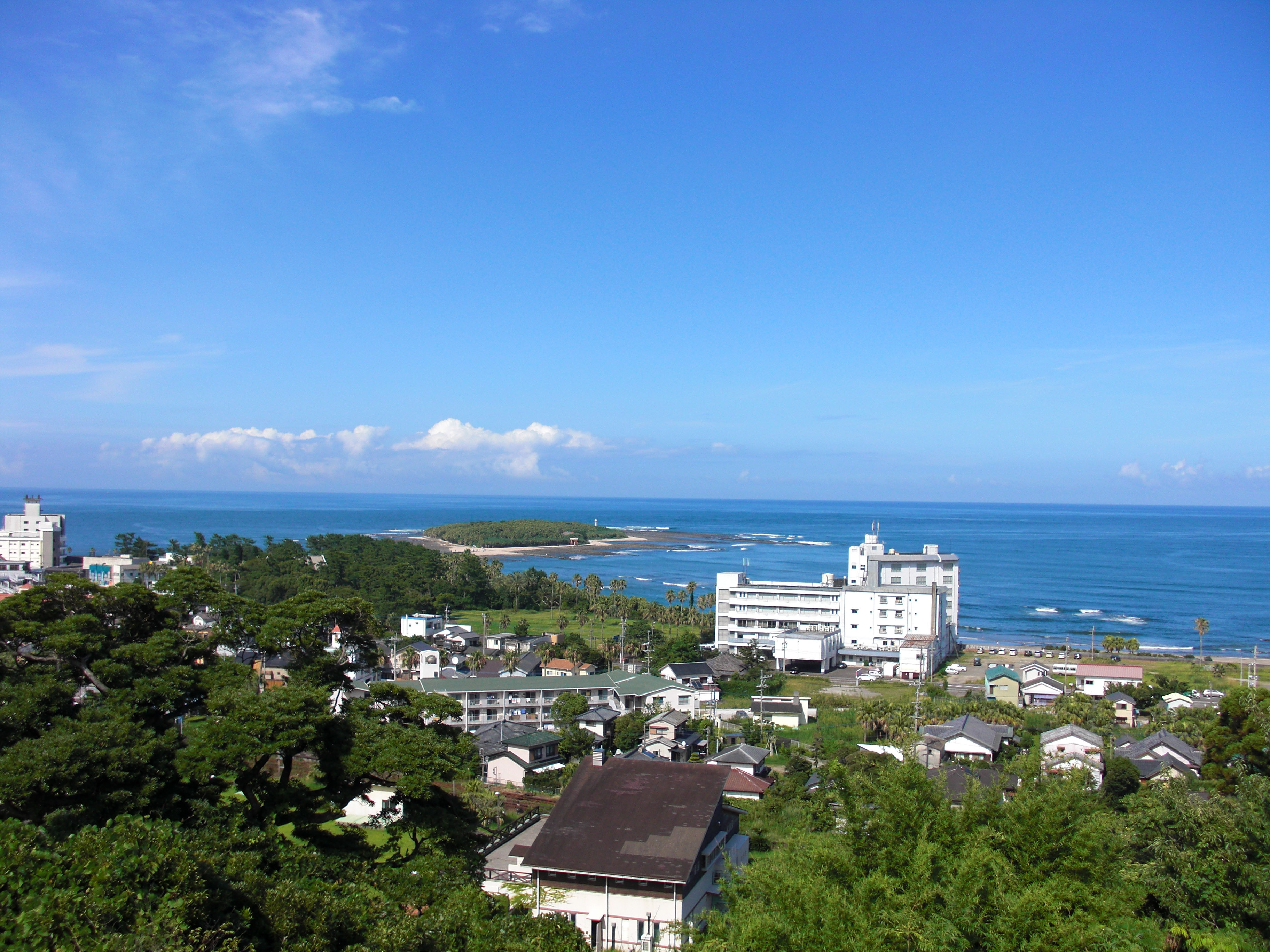 青島パーキング